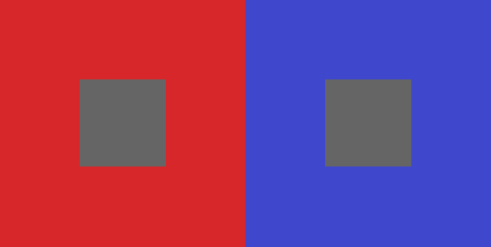 Il grigio appare diversamente se posto su sfondi diversi